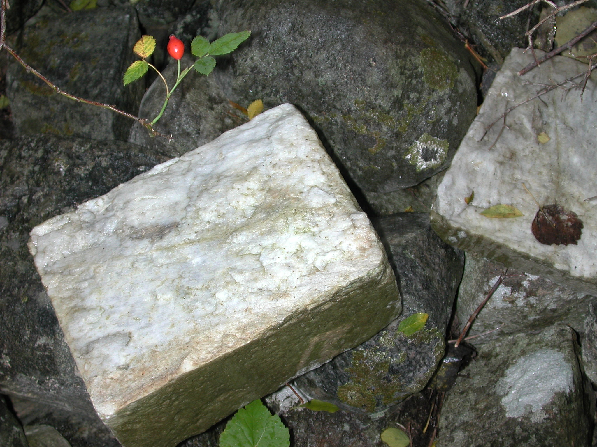 Marmorstein fra en av middeladerkirkene på Borgund